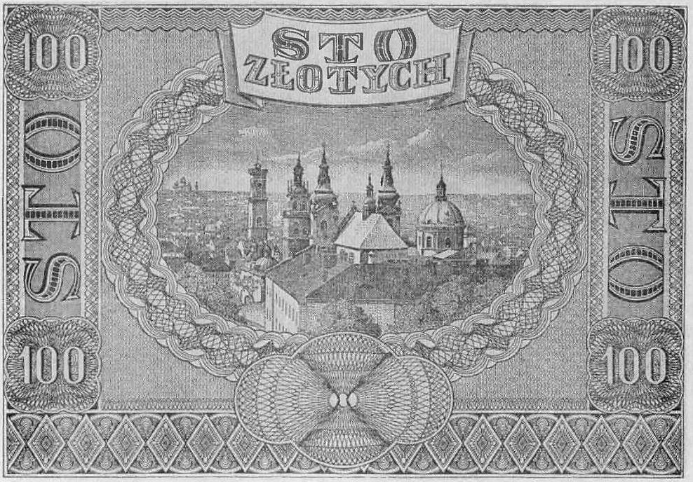 Banknot 100 zł wprowadzony 1 sierpnia 1941 przez Ban Emisyjny w Krakowie podczas okupacji niemieckiej.